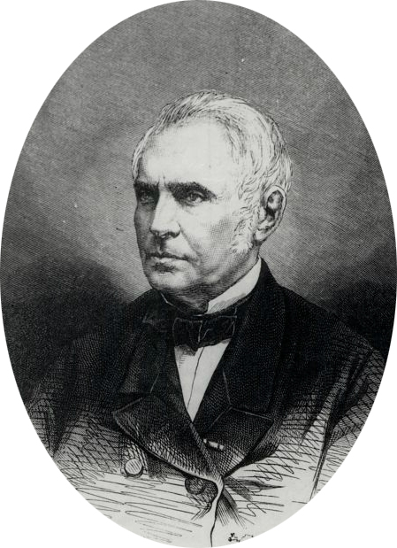 Portret van Cornelis Outshoorn (1810-1875), architect te Amsterdam